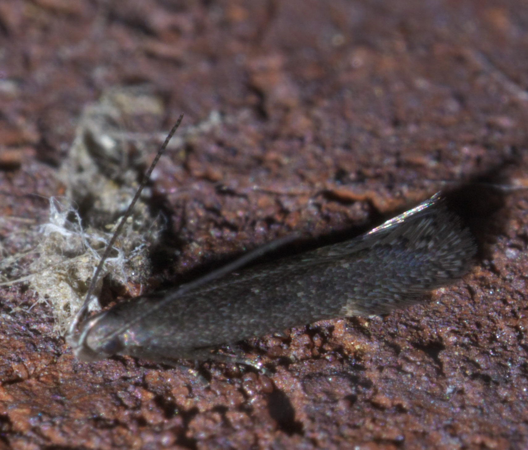 Syncopacma palpilineella, Hodges #2222, Size: 5 mm, ID Confidence: 84